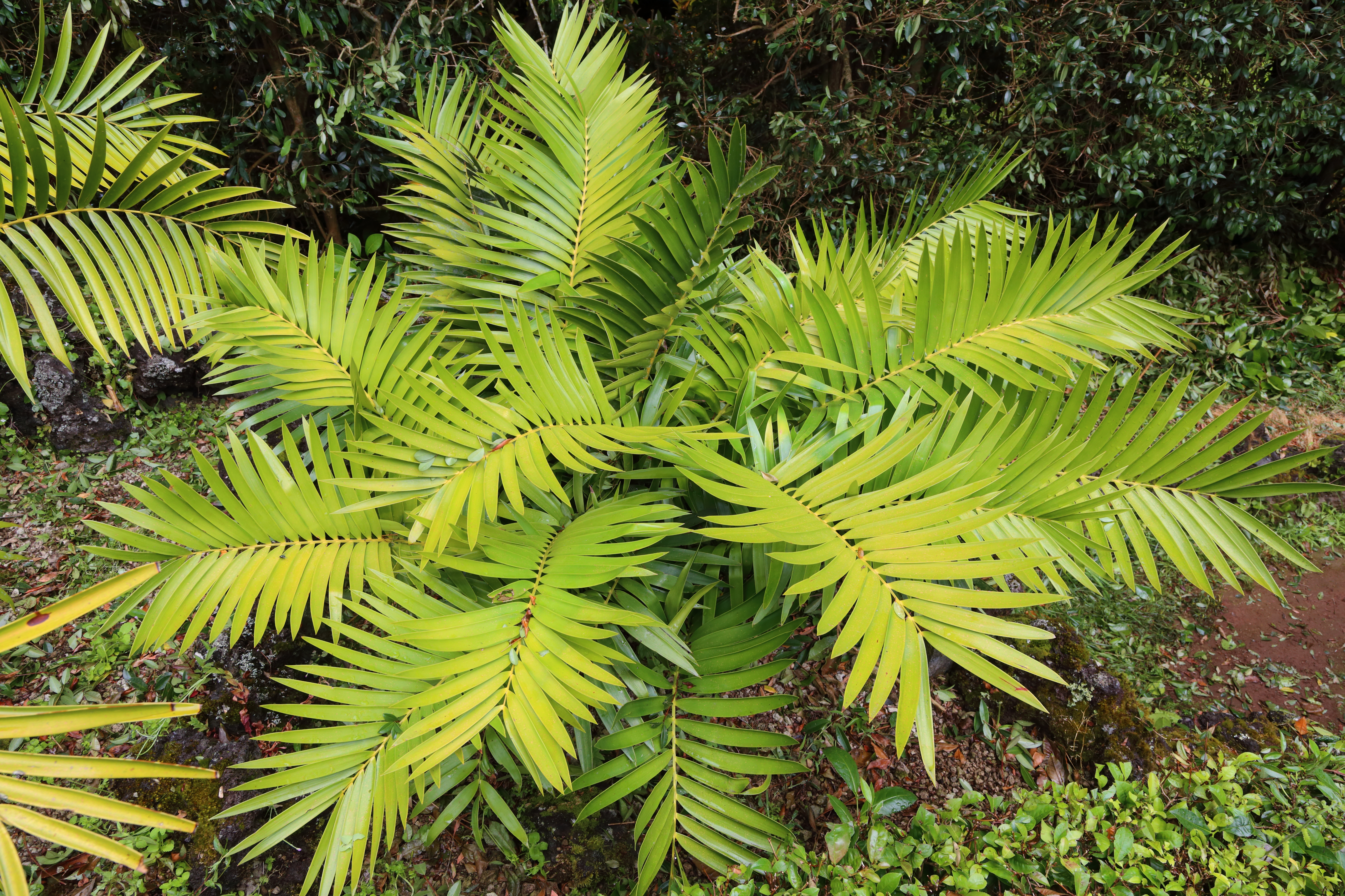 Ceratozamia robusta i parken Terra Nostra, Furnas, São Miguel, Azorerna.